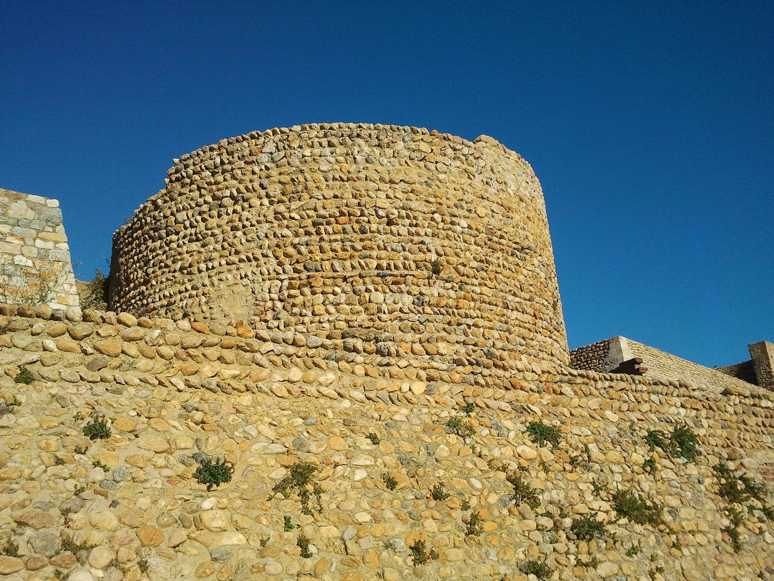 Tour du château de Canet-en-Roussillon